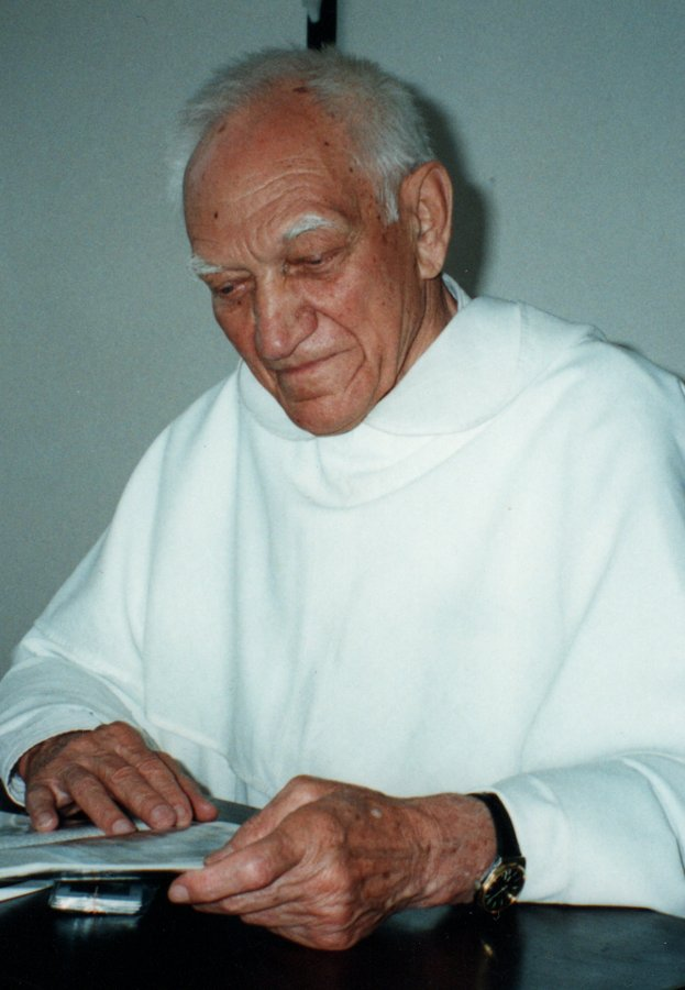 Jiří Maria Veselý v r. 1995